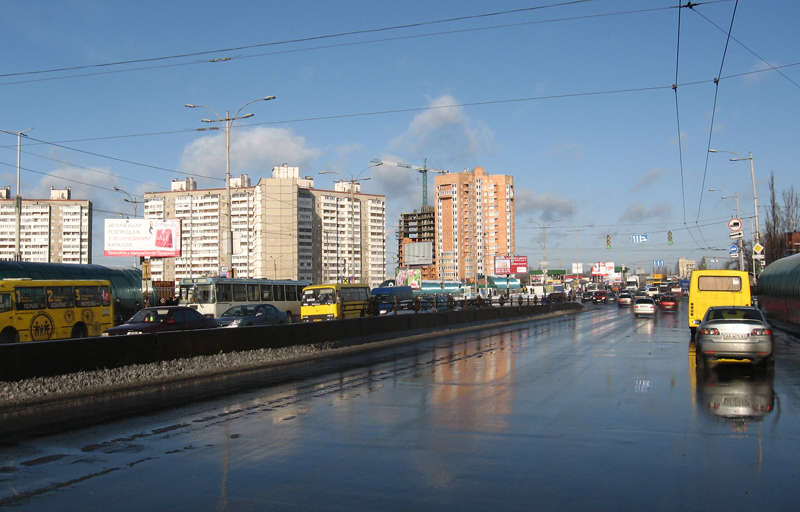 Проспект Палладина в Киеве в районе станции метро Академгородок